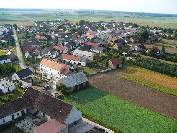 widok Chrzelic